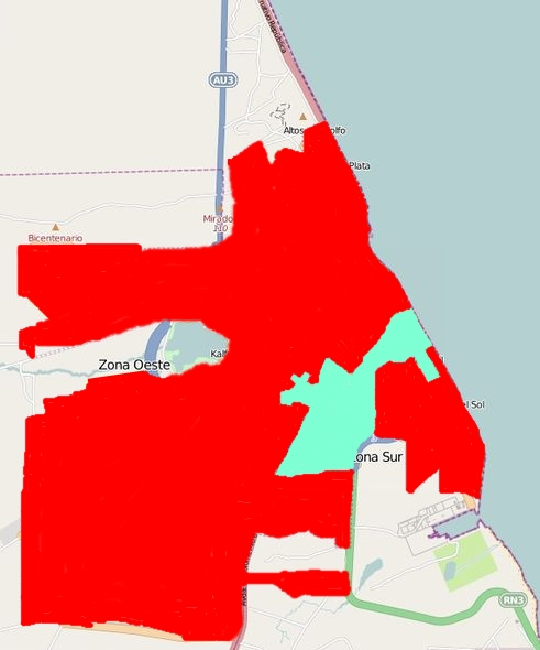 Zonas en donde si hay agua y no hay This map may be incomplete, and may contain errors. Don't rely solely on it for navigation.